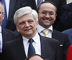 Botschafterkonferenz 2013, Minoritenplatz, Wien, 02.09.2013 (Hans Peter Manz) (cropped)